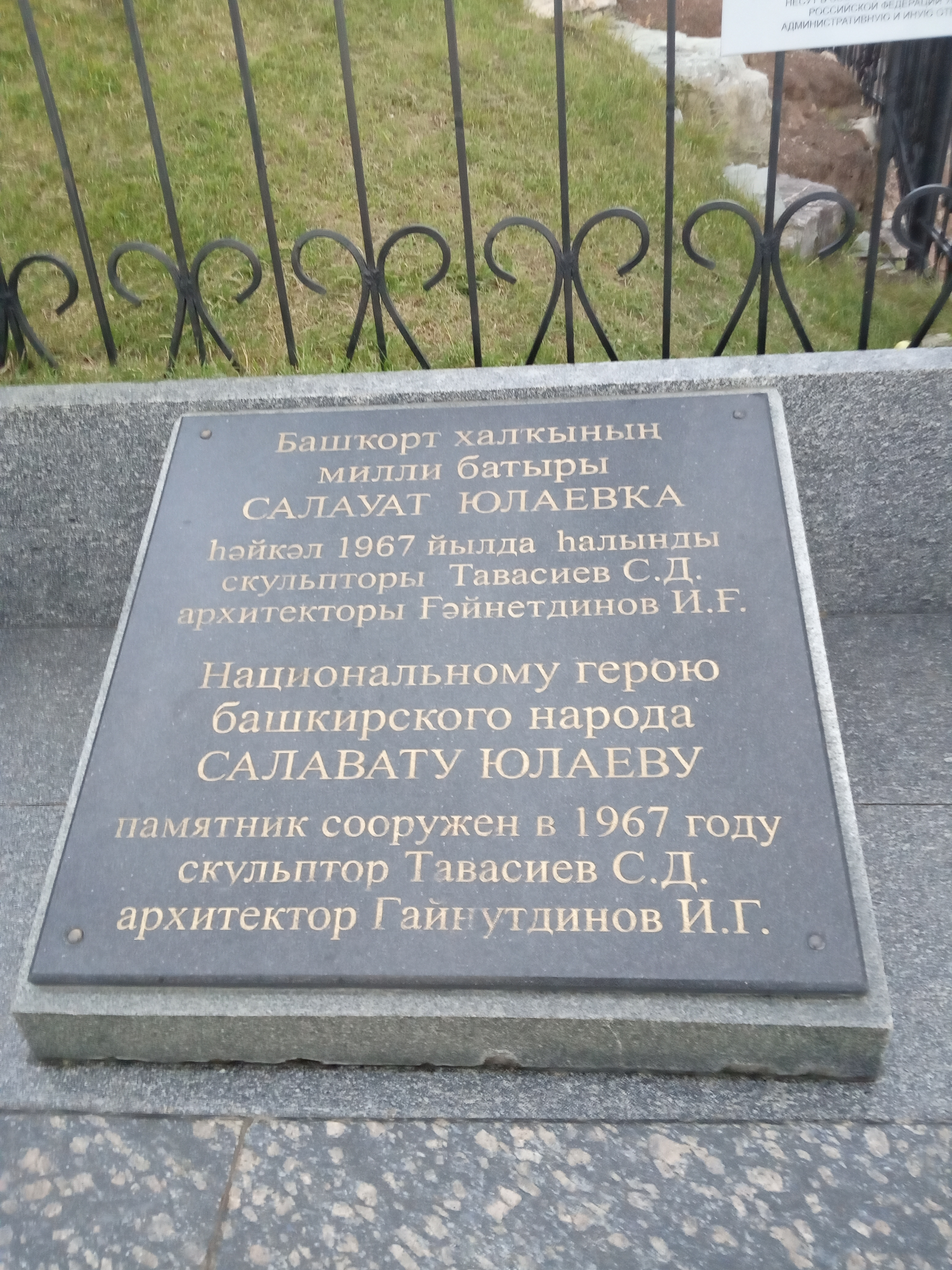 Памятная доска у памятника Салавата Юлаева